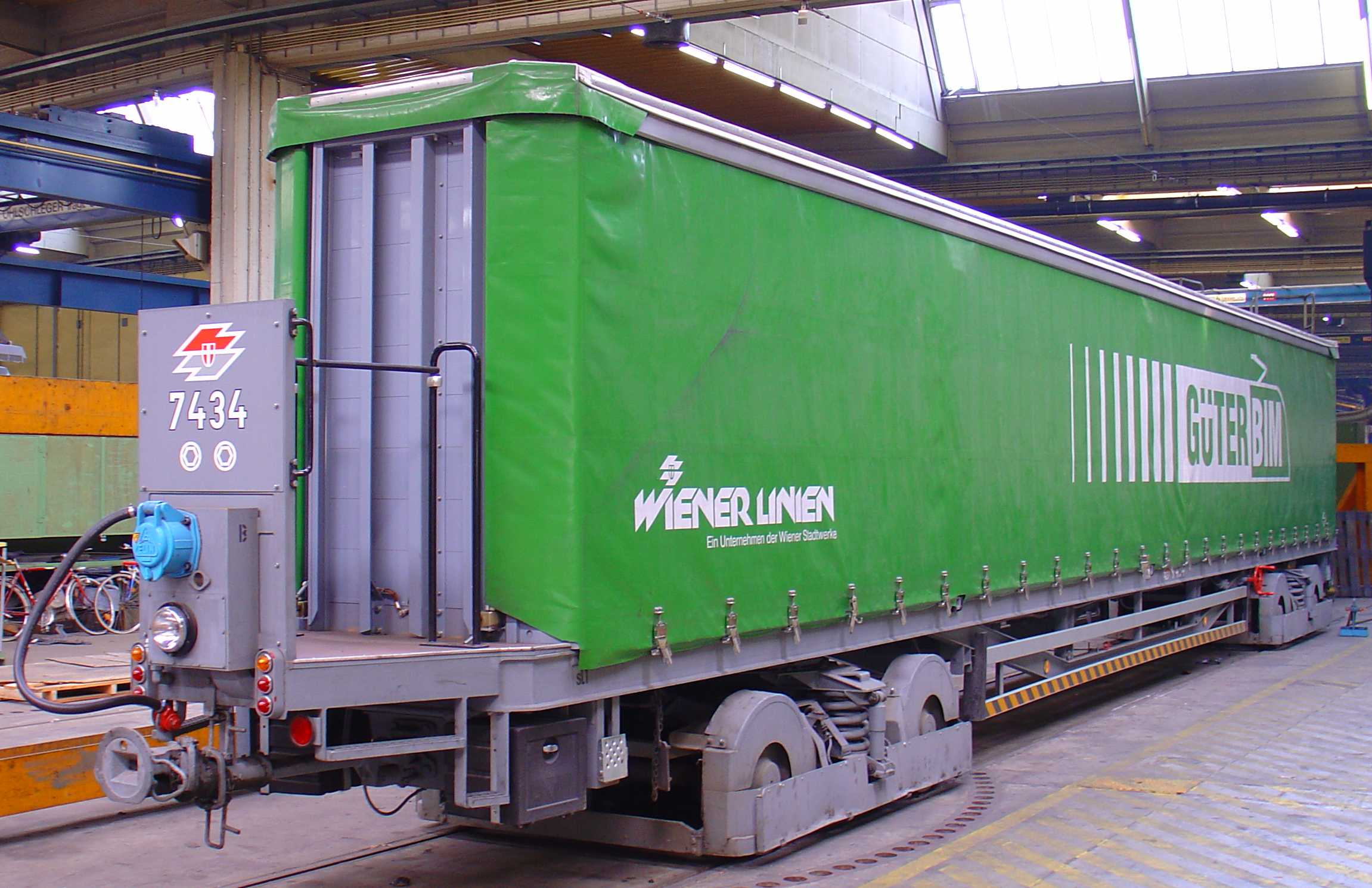 Güterbim in der Hauptwerkstätte der Wiener Linien. Aufnahme vom 13.10.2006